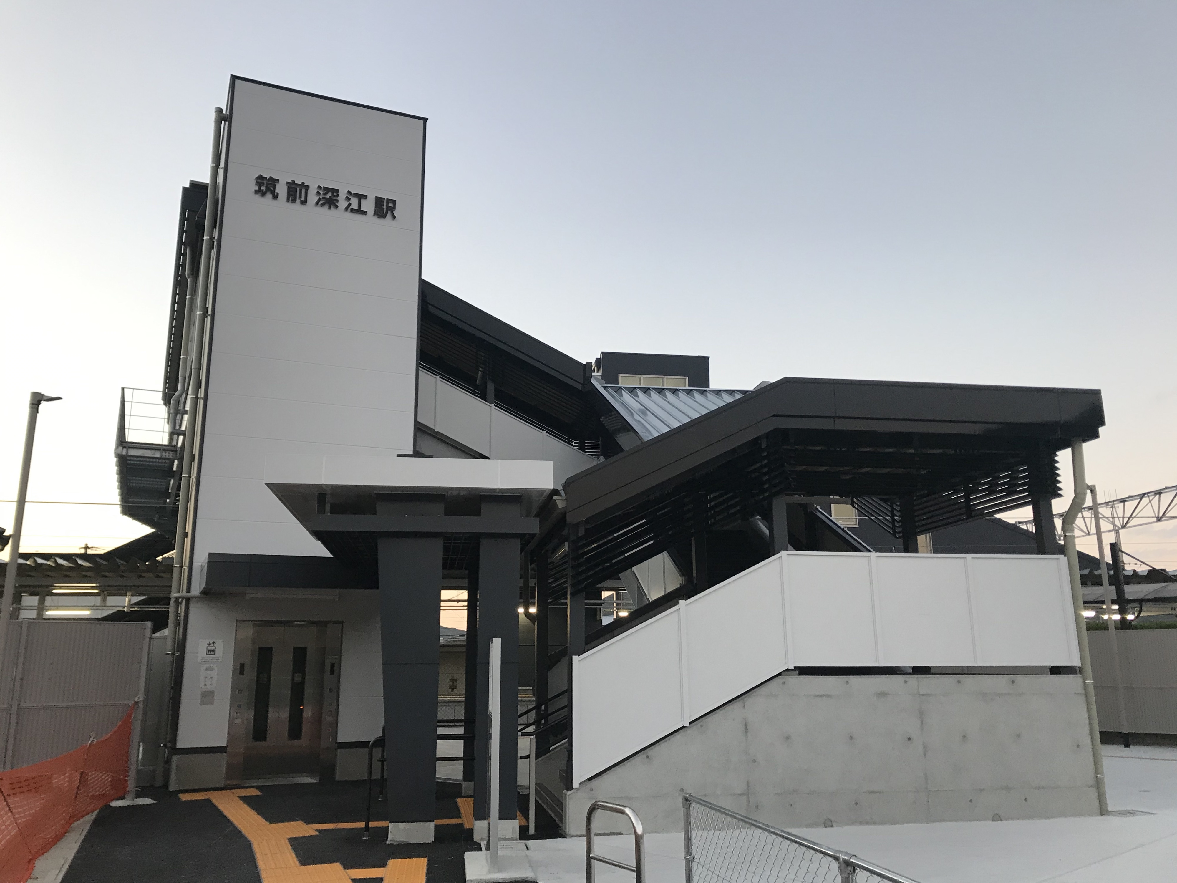 筑前深江駅の駅舎